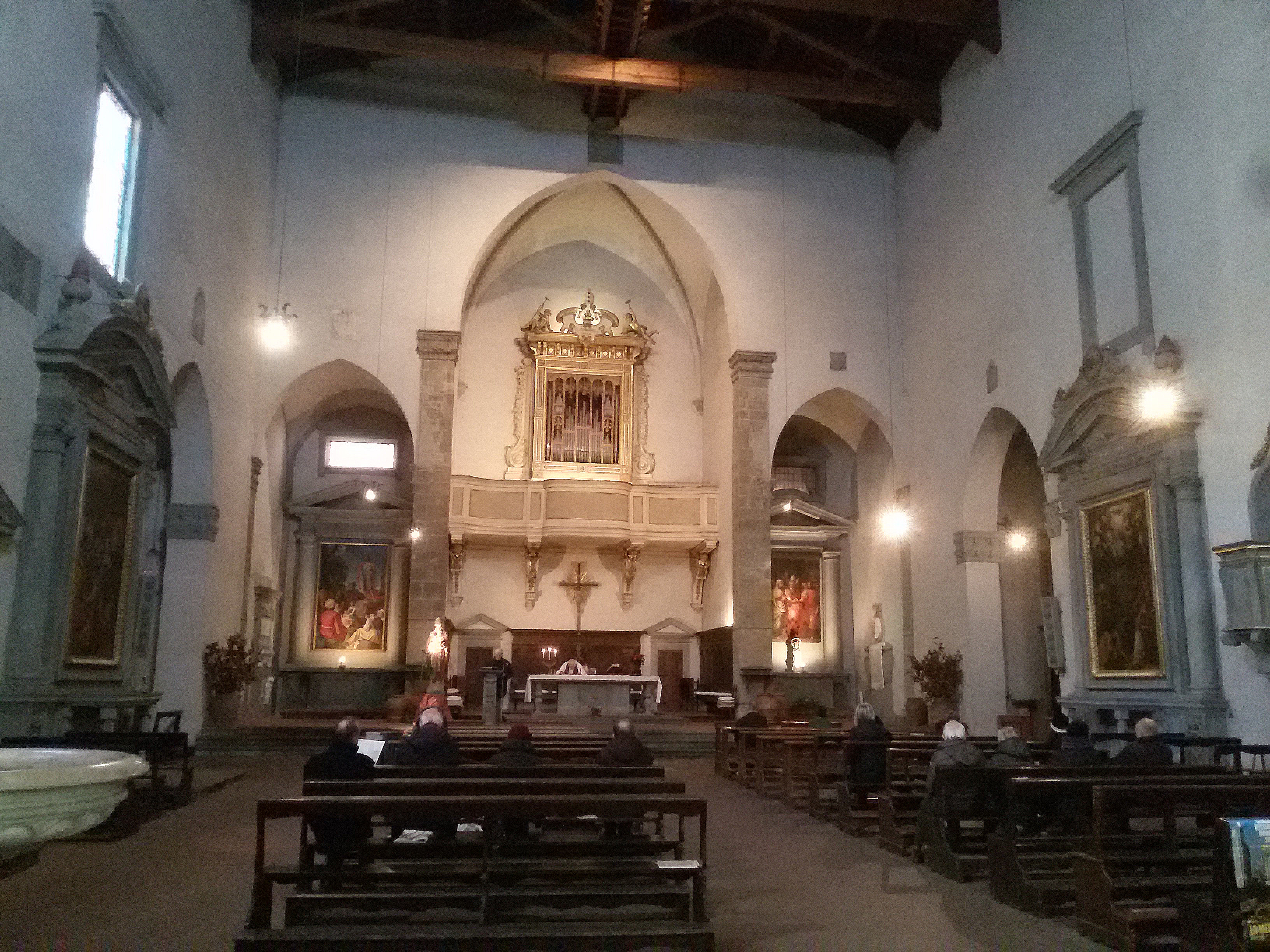 Veduta interna.